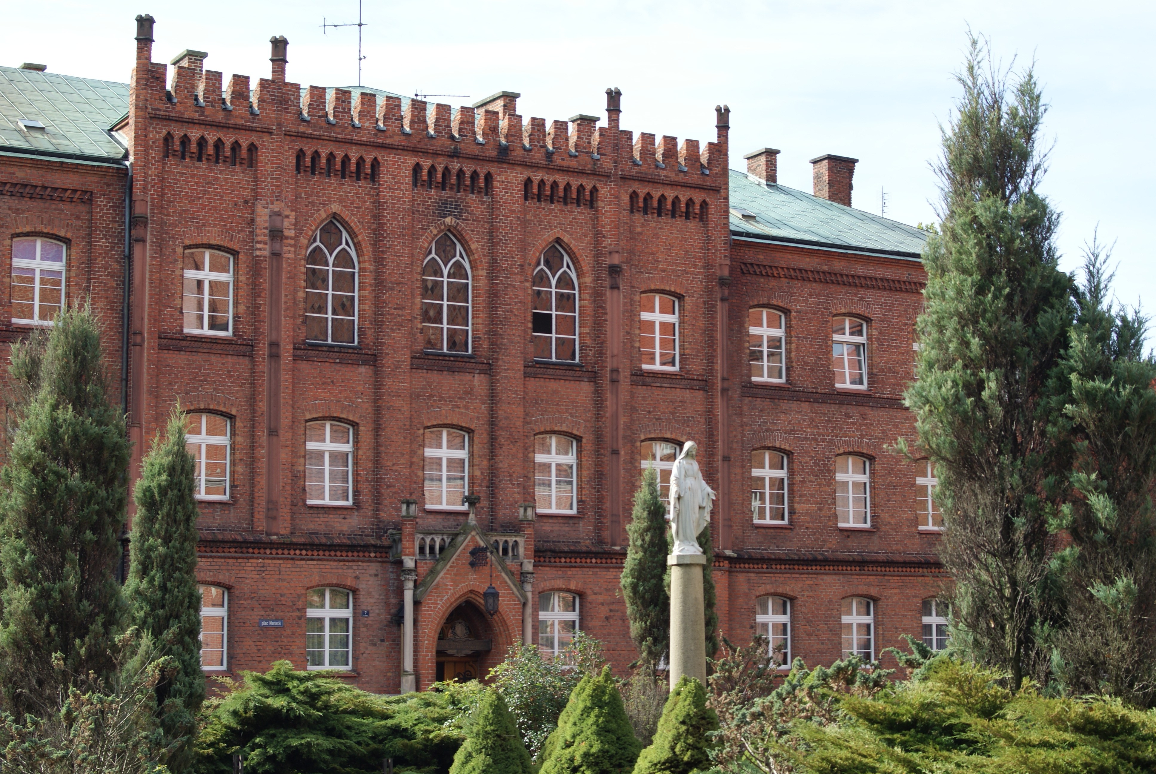 Pelplin, pl. Mariacki 7/al. Cystersów - klasztor, obecnie seminarium duchowne, 2 poł. XIII, 1 poł. XIV, 1859-1868